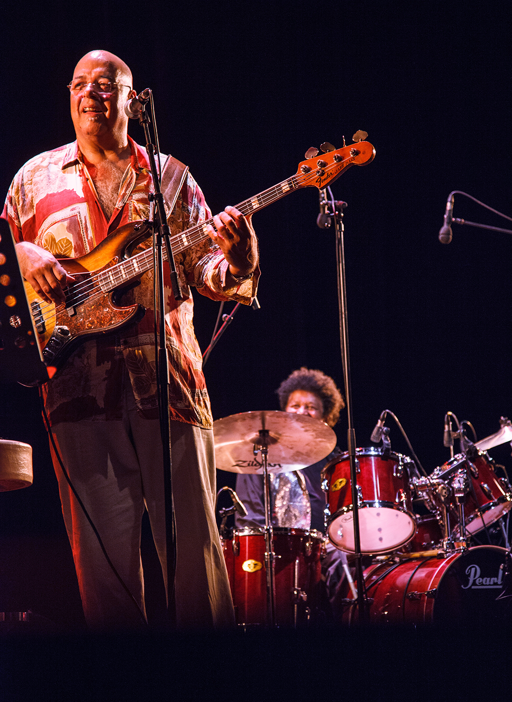 Arismar do Espírito Santo em show de João Donato, realizado no Espaço Pierre Cardin. Foto: Fernanda Peruzzo/Ministério da Cultura